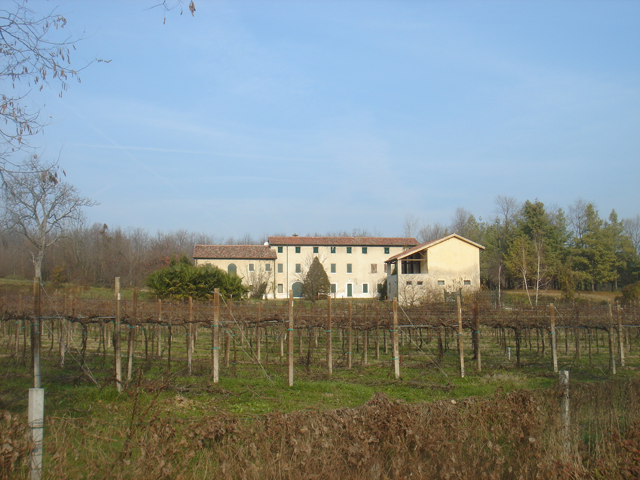 Castello Roganzuolo (San Fior, Treviso, Italia): veduta complessiva della casa rurale di via Cancian, esempio chiarissimo di struttura rurale del veneto orientale, modulato in due brocchi più gli annessi rustici.